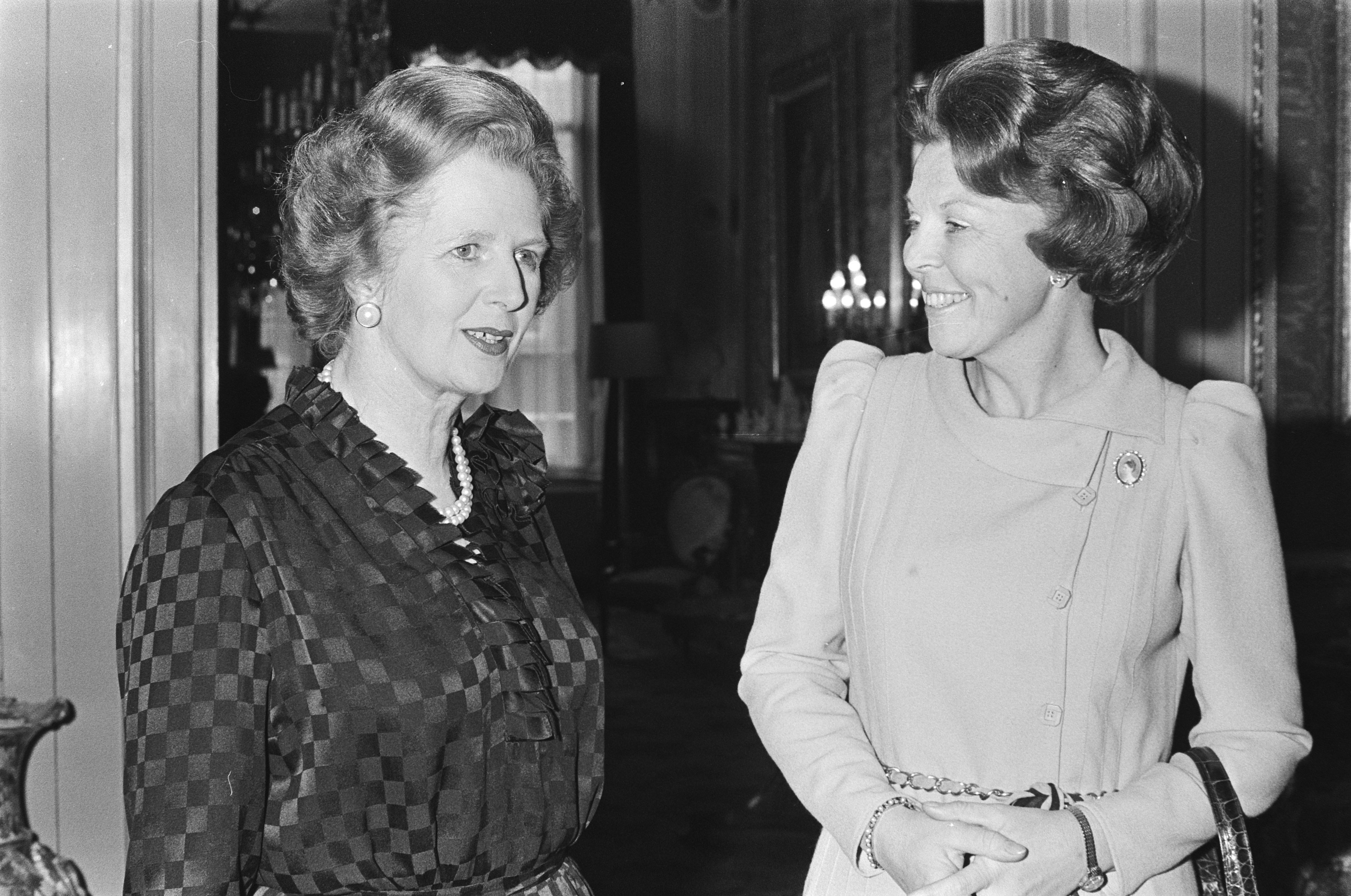 Collectie / Archief : Fotocollectie Anefo Reportage / Serie : [ onbekend ] Beschrijving : V.l.n.r. Premier Margareth Thatcher en Koningin Beatrix op paleis Noordeinde Datum : 6 februari 1981 Locatie : Den Haag, Noordeinde, Zuid-Holland Trefwoorden : audiënties, koninginnen, meubilair, ministers-presidenten Persoonsnaam : Beatrix (koningin Nederland), Thatcher, Margaret Fotograaf : Poolfoto, [onbekend] Auteursrechthebbende : Nationaal Archief Materiaalsoort : Negatief (zwart/wit) Nummer archiefinventaris : bekijk toegang 2.24.01.05 Bestanddeelnummer : 931-3059